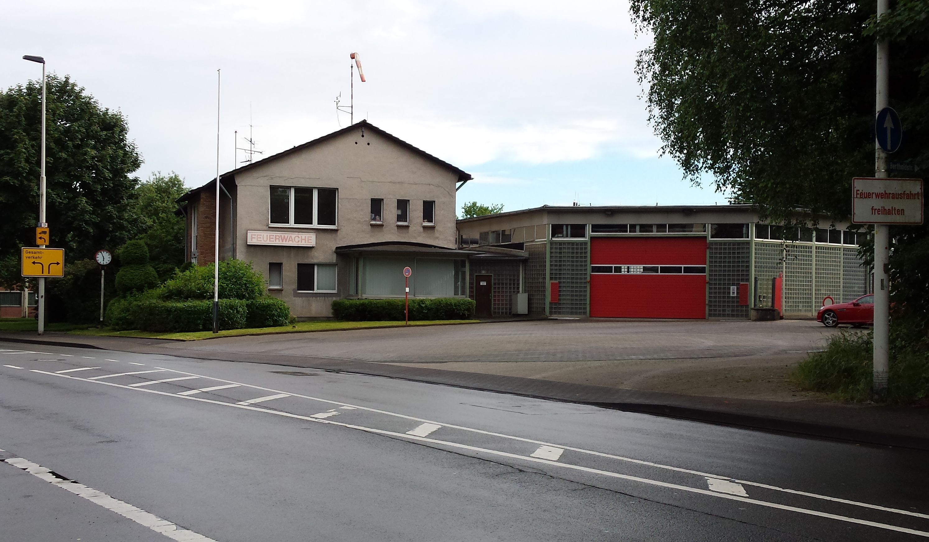 Feuer- und Rettungswache III, Solingen-Wald